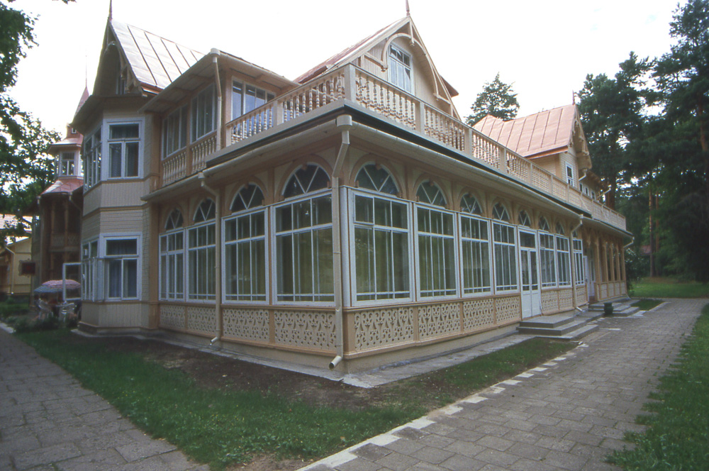 Druskienniki Spa